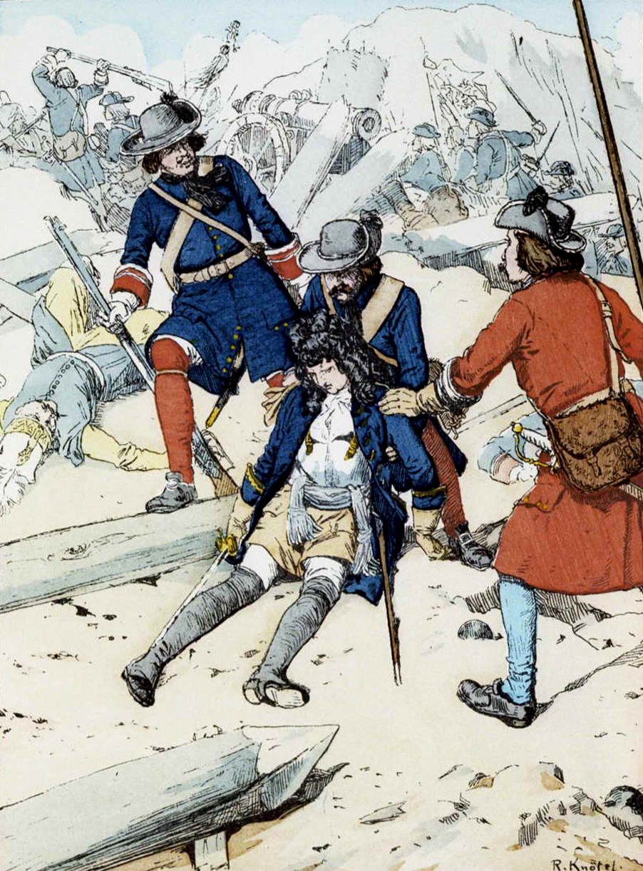 Regiment "Kurland" 1686. Der verwundete Prinz Alexander von Kurland während des Sturms auf Buda. Im Vordergrund: ein Offizier und Alexander. Links und hinter ihm: rechts die Musketiere des Regiments; ein Unteroffizier des Regiments.